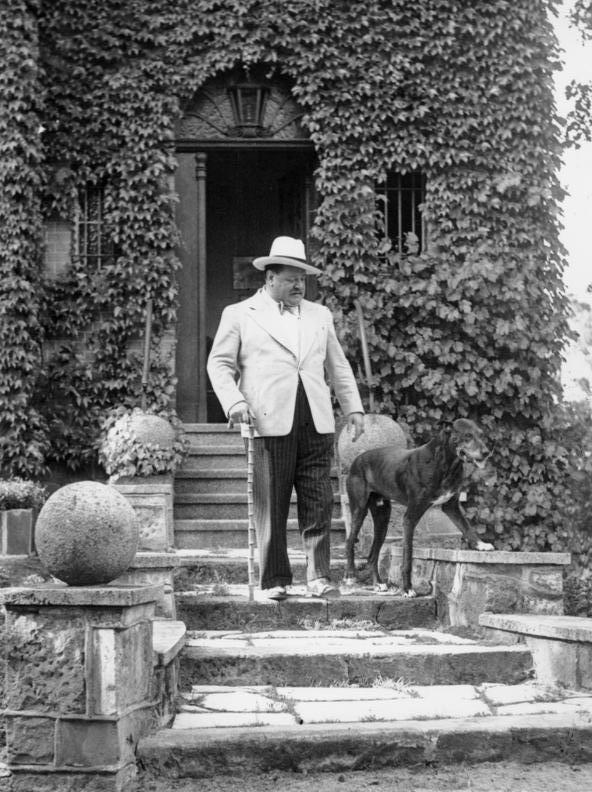 Besuch bei Heinrich George in Wannsee, Bismarckstr. 34 UBz: vor seinem Haus mit seiner Dogge "Fellow". Foto Waske (Aufnah.: 30erJahre)